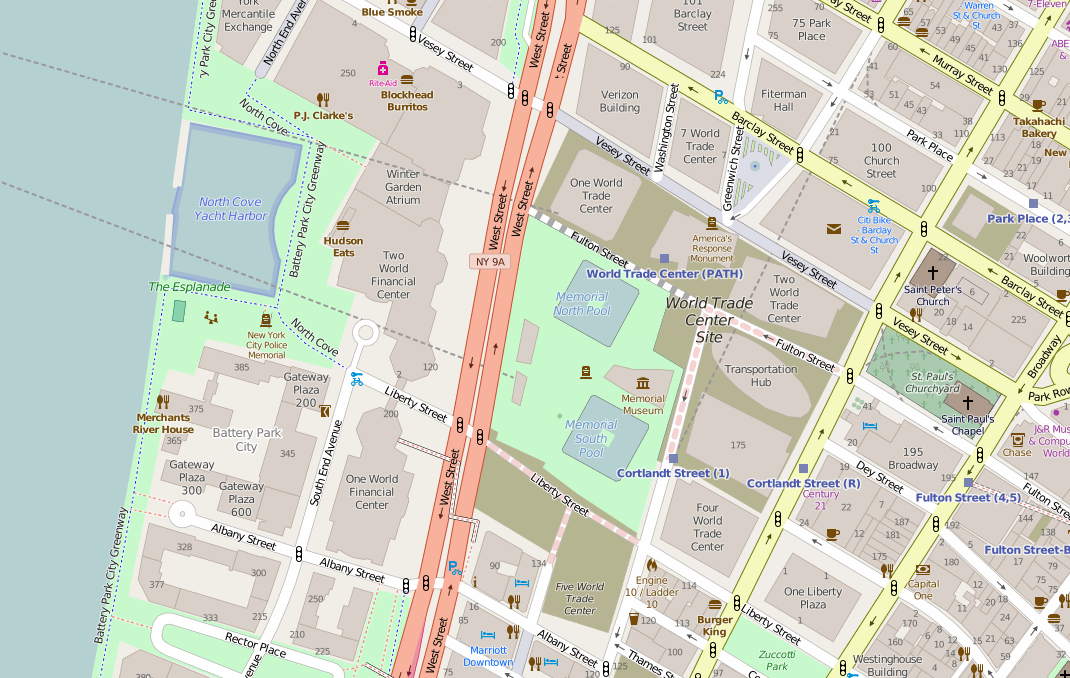 Mapa de la localización del rascacielos Sitio del World Trade Center en la Nueva York This map may be incomplete, and may contain errors. Don't rely solely on it for navigation.